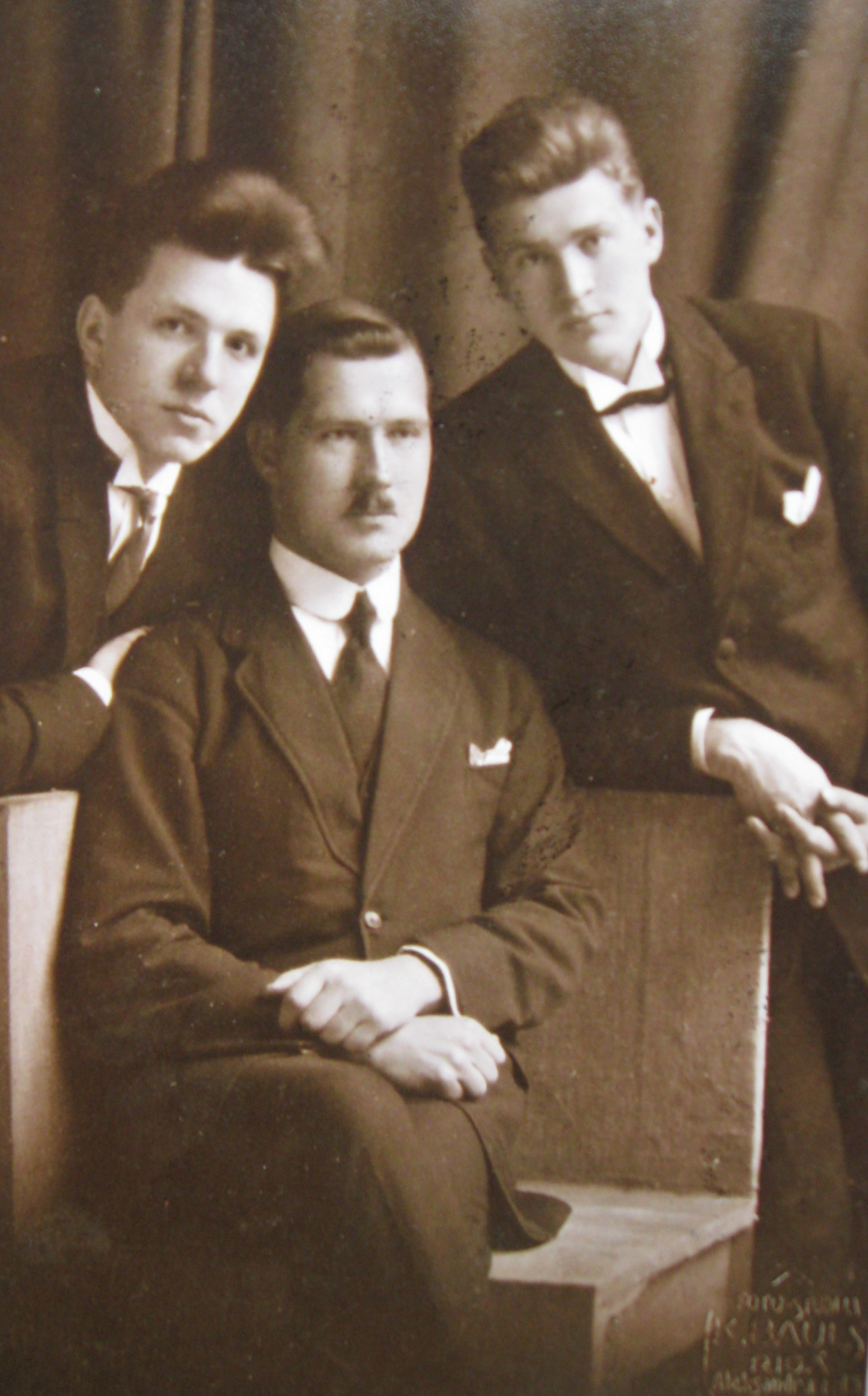 Komponists kopā ar brāļiem